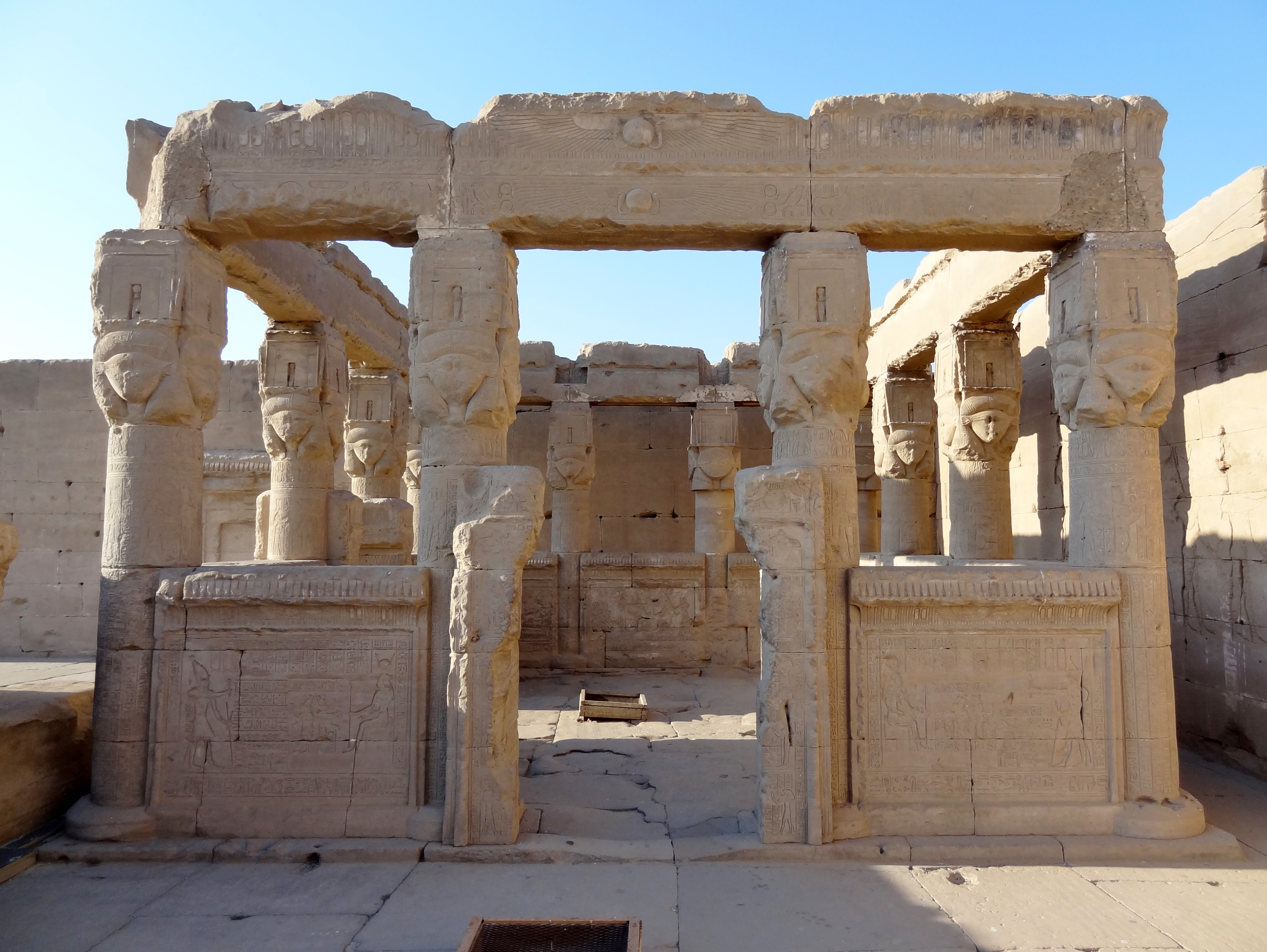 Kapelle der Scheibe auf dem Dach des Hathor-Tempels von Dendera, Ägypten